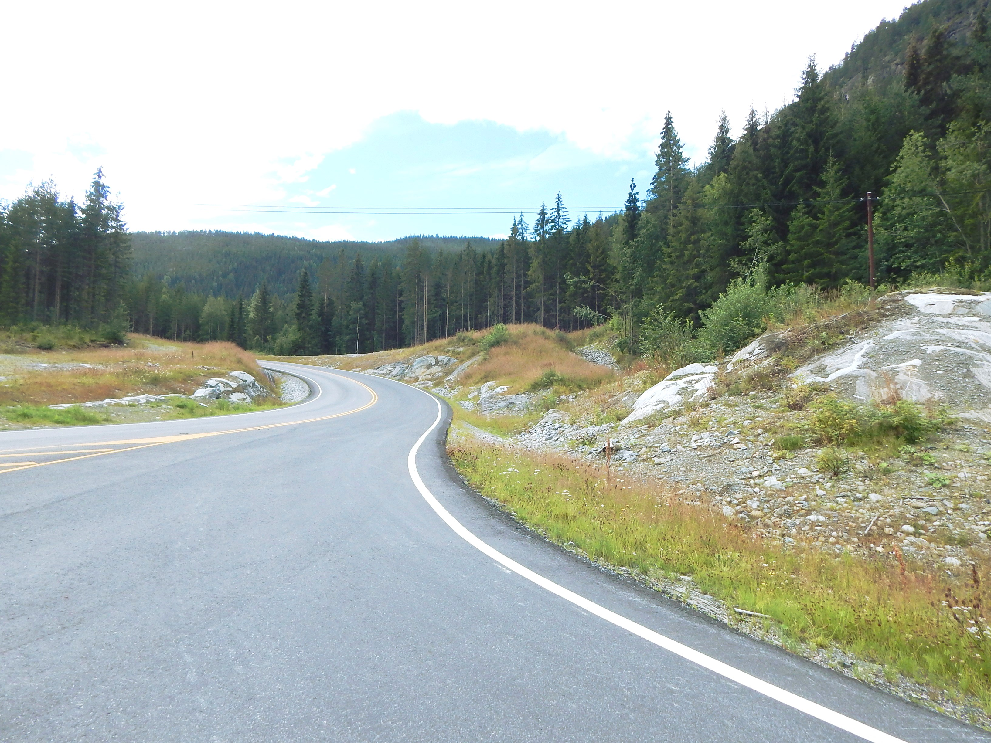 Åsemyrvegen (FV2460, tidl. FV228) tar av fra E16.